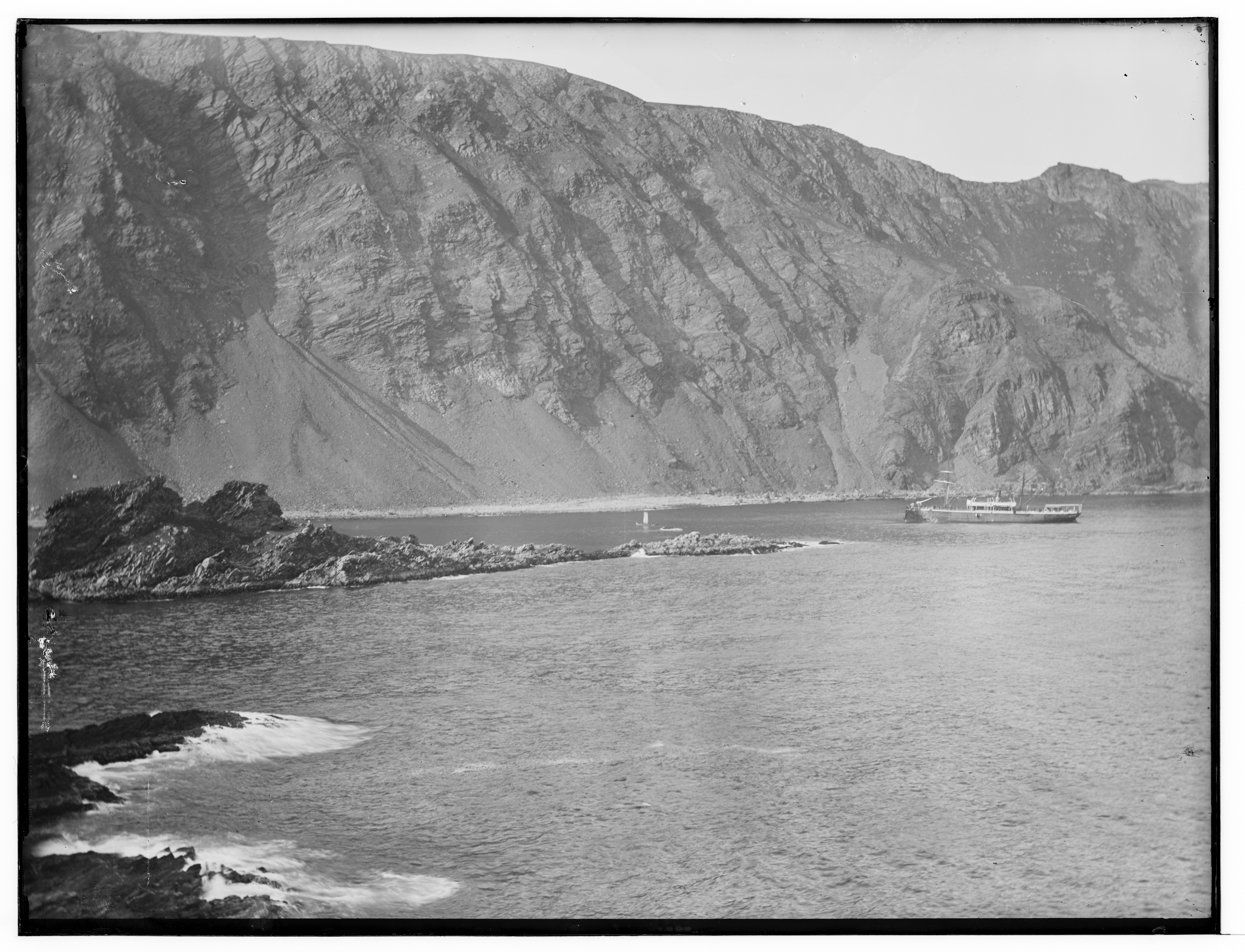 Bildet er hentet fra Arkivverket. Innløpet, Kjelvik, Finnmarkens amt Arkivinstitusjon : Riksarkivet Arkivnavn : Havnedirektoratet Sted : Norge, Finnmark, Lebesby, Emneord: Sjø, Fjell, Landskap Avbildet